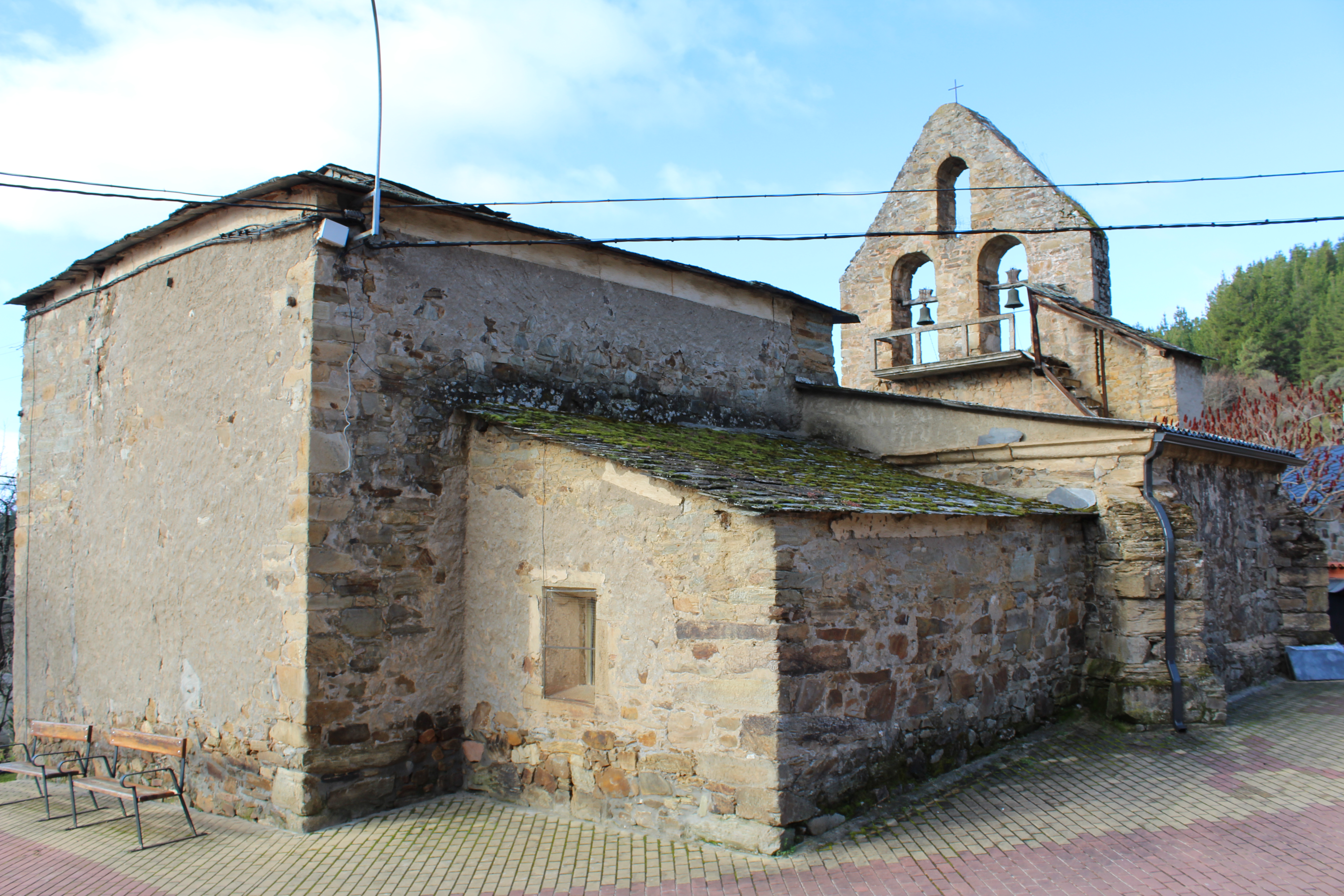 Iglesia de San Miguel de Arganza vista desde la trasera